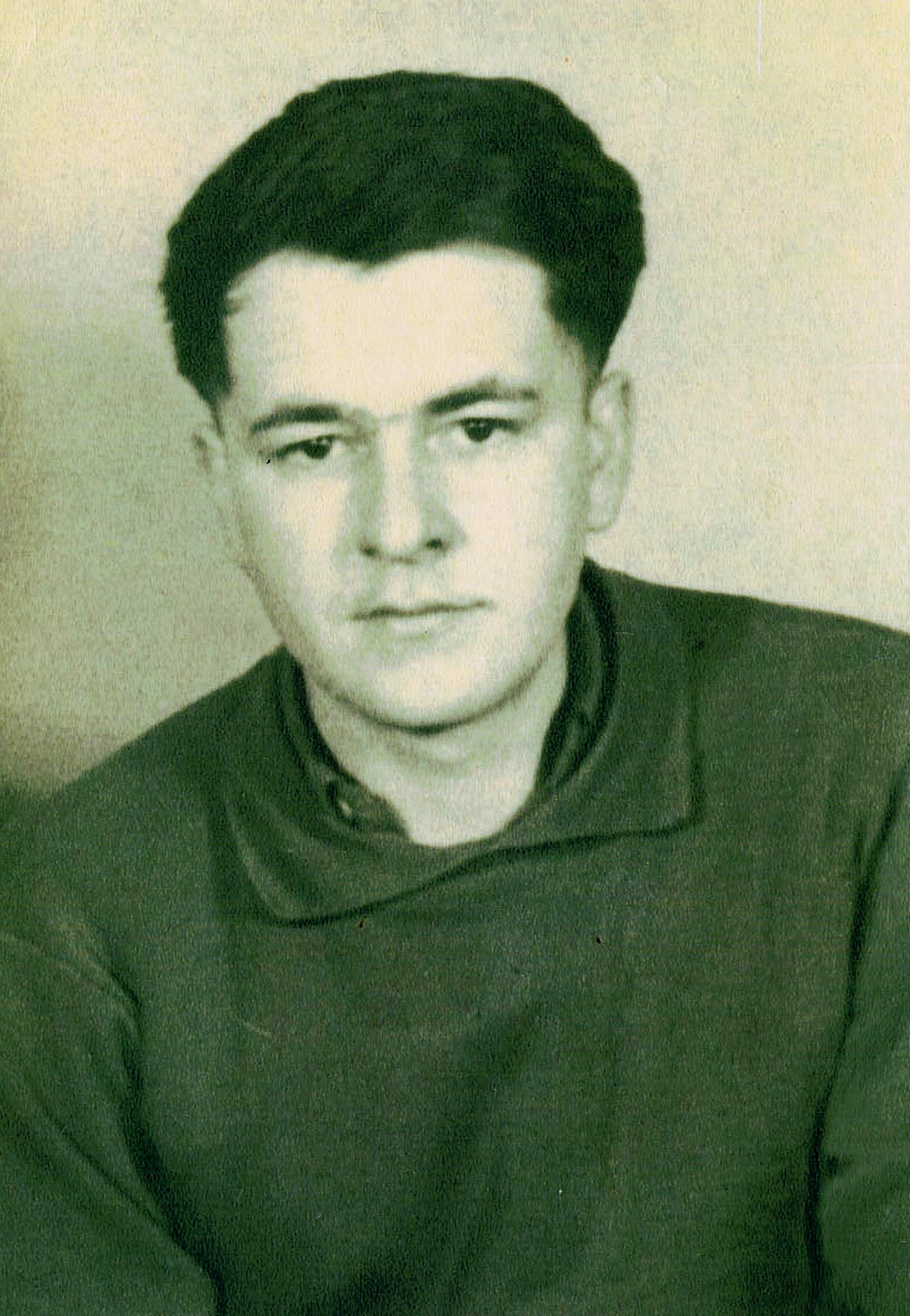 André PAYAN (1913-1984) est né le 6 juillet 1913 à Entraunes (Alpes Maritimes - France) et il est décédé le 7 avril 1984 à Nice. Ancien Elève-maître de l'Ecole normale de Nice puis Elève-professeur de l'Ecole normale supérieure de l'enseignement technique à Paris. Sorti officier de l'Ecole des officiers de réserve de Saint-Maixent, il est fait prisonnier en juin 1940 dans la "poche" de Dunkerque. En captivité en Allemagne dans la forteresse de Königstein, il est libéré le 8 mai 1945 par l'Armée rouge et, parlant le russe et l'allemand, il se retrouve au coeur de la délivrance des célèbres collections du musée de Dresde qui y sont alors entreposées. Professeur de géographie touristique au Lycée d'hôtellerie et de tourisme de Nice à partir de 1945, il va créer l'Association mondiale pour la formation touristique (AMFORT) et participer aux instances de l'Association internationale du transport aérien (IATA) avant de rejoindre en 1970 le Bureau international du travail (BIT) en tant qu'expert de l'aide au développement touristique (PNUD-ONU) au Liban puis en Tunisie, en Irak, en Guinée et enfin au Cameroun.